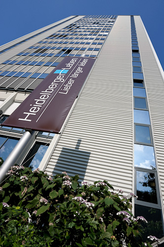 Firmensitz der Heidelberger Lebensversicherung AG